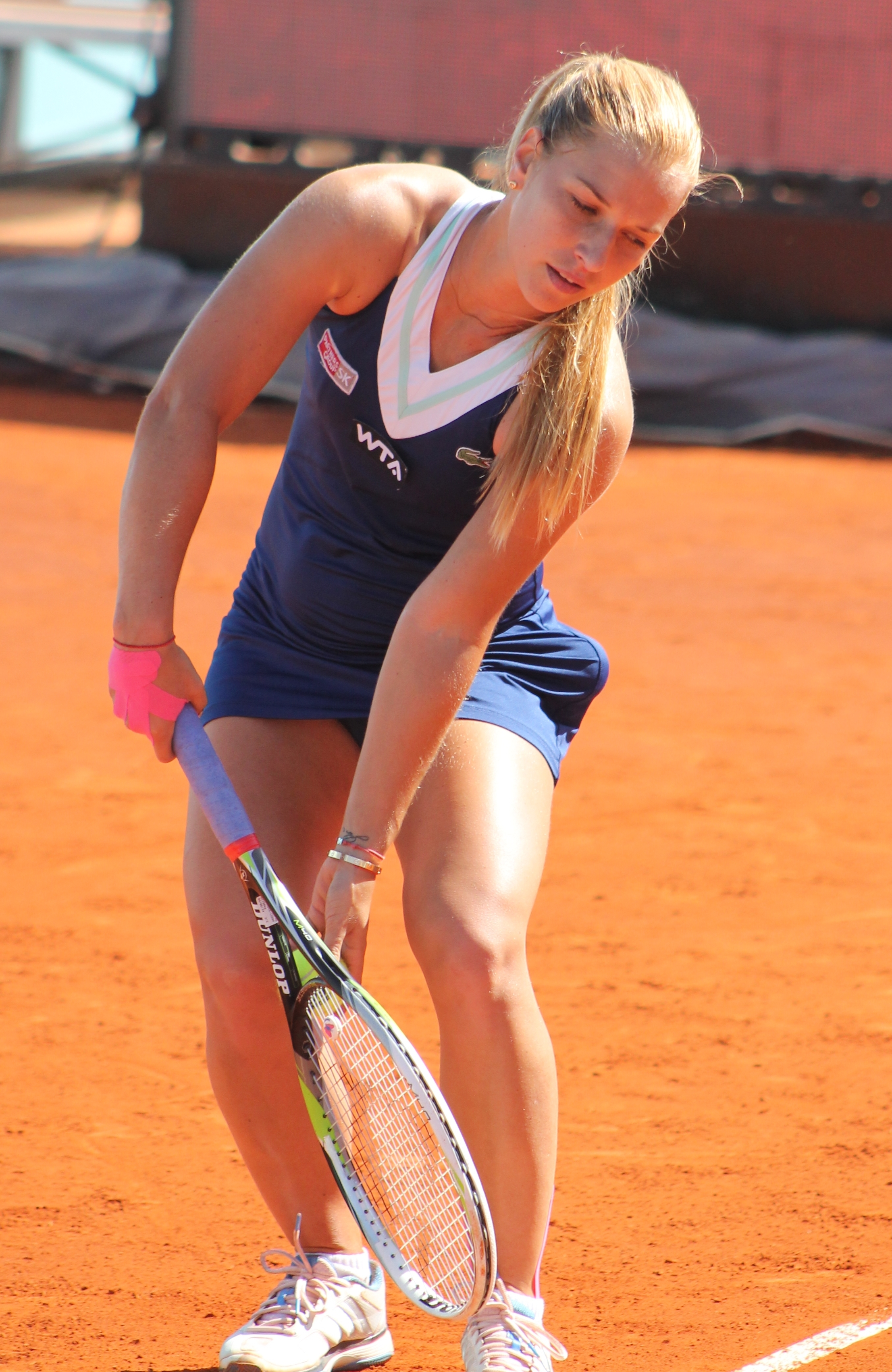 Cibulkova MA14